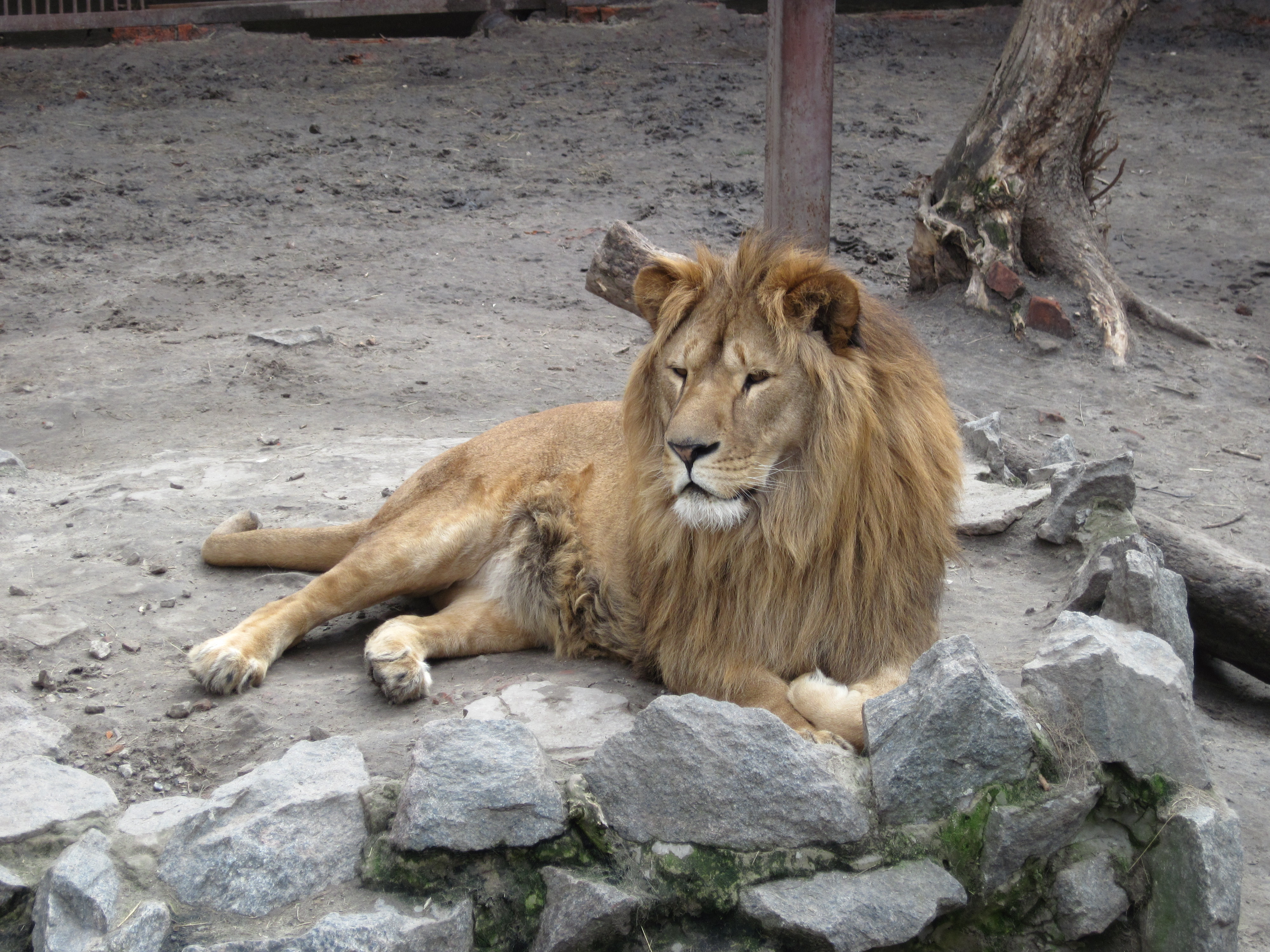 Lion mâle (Panthera leo) au parc zoologique de Kharkiv (Ukraine).